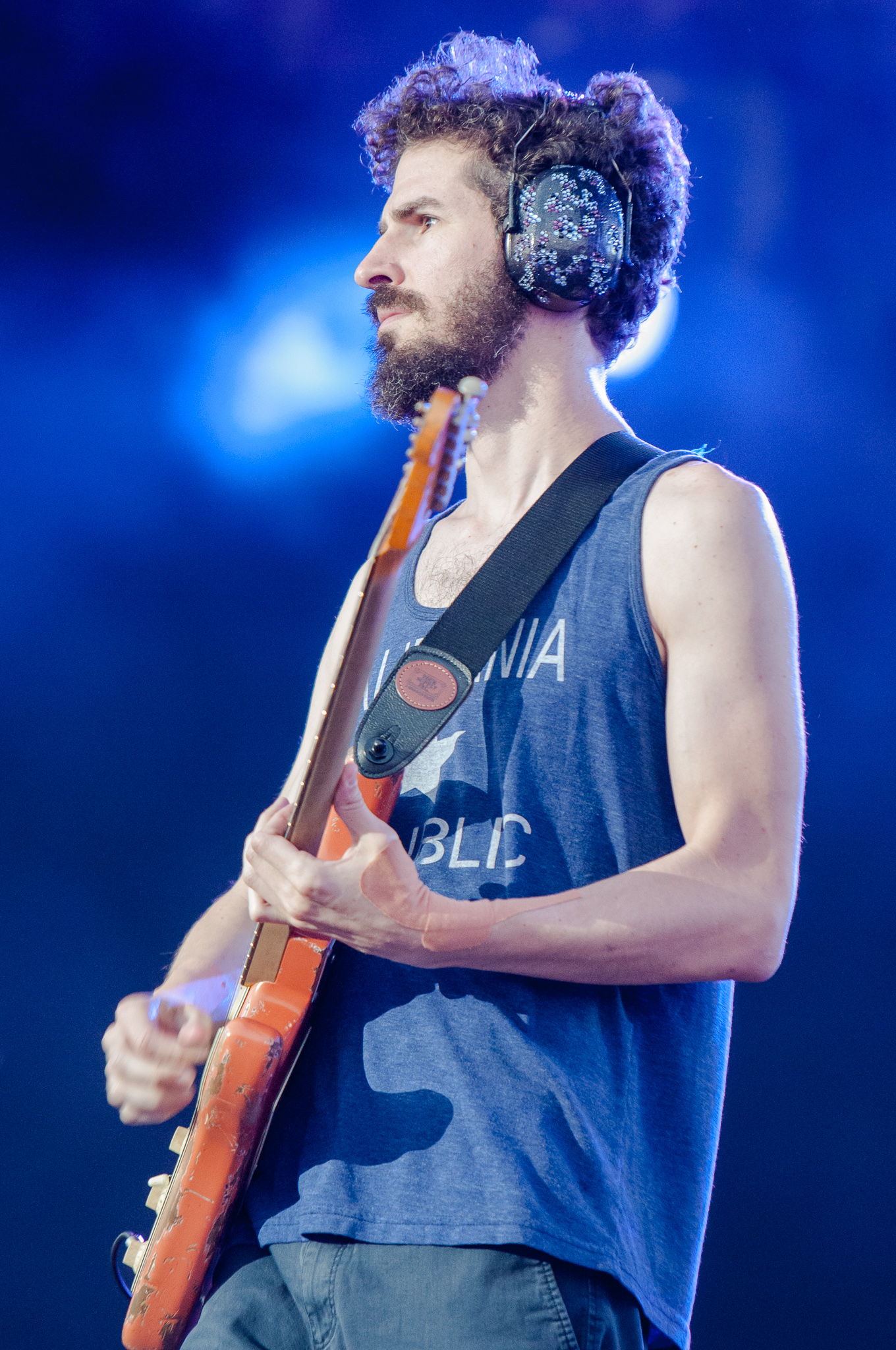 ARGO-Konzerte,Brad Delson,Centerstage,Konzert,Linkin Park,Livekonzert,Livemusik,Musik,RiP,Rock im Park 2014